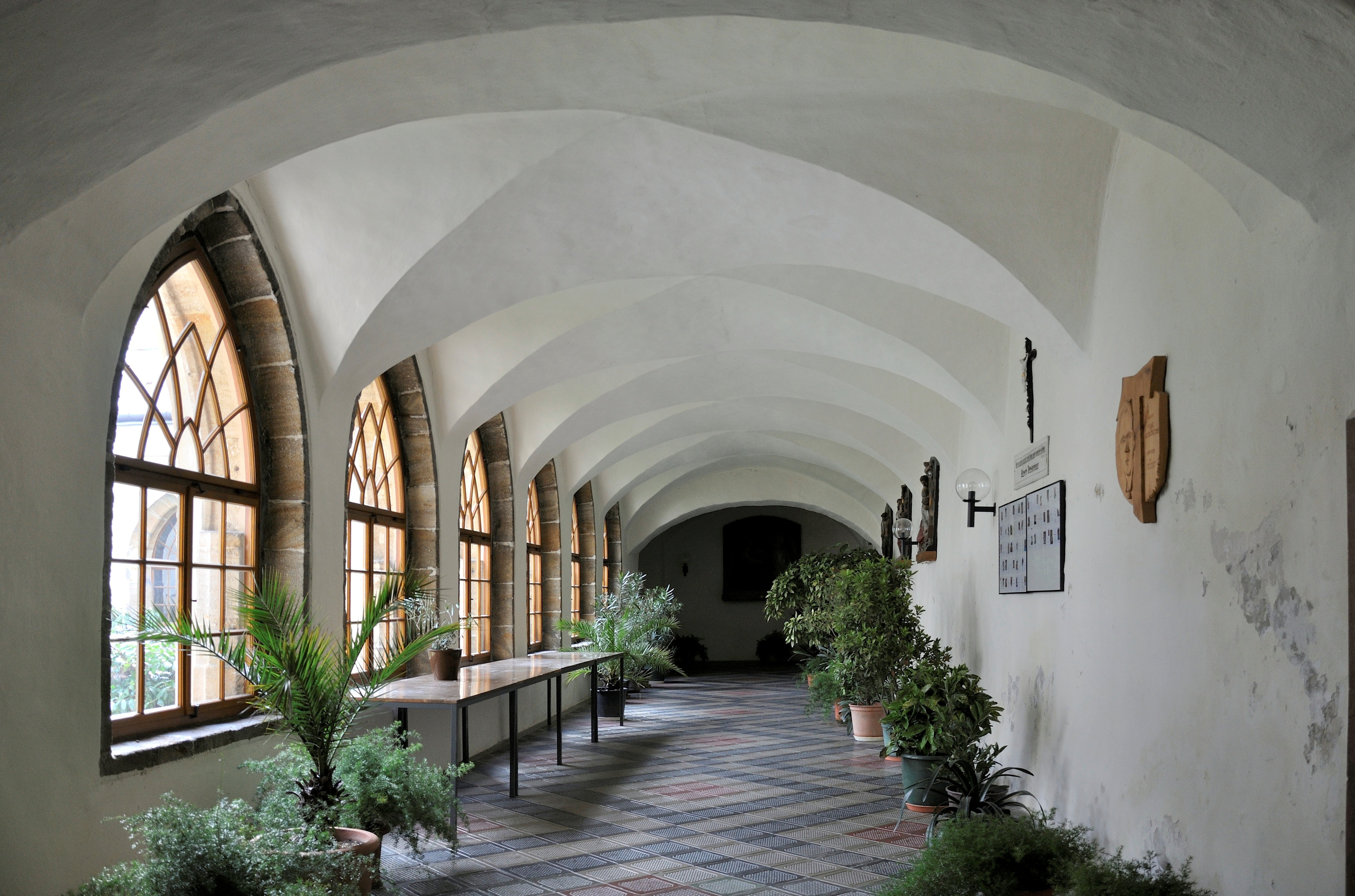 Ehem. Franziskaner- bzw. Minoritenkloster mit ehem. Klosterkirche hl. Josef